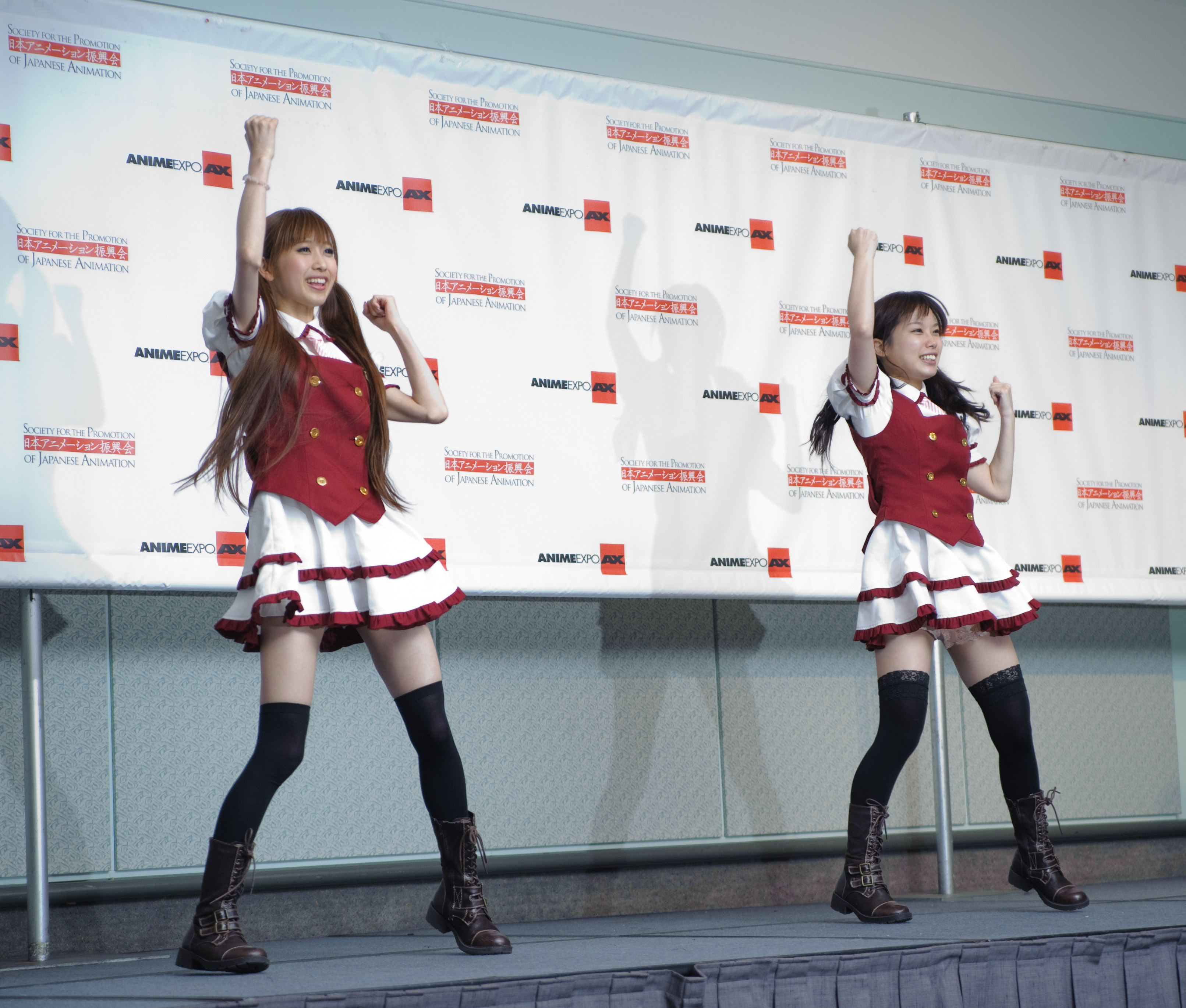 Danceroids at Anime Expo 2011.